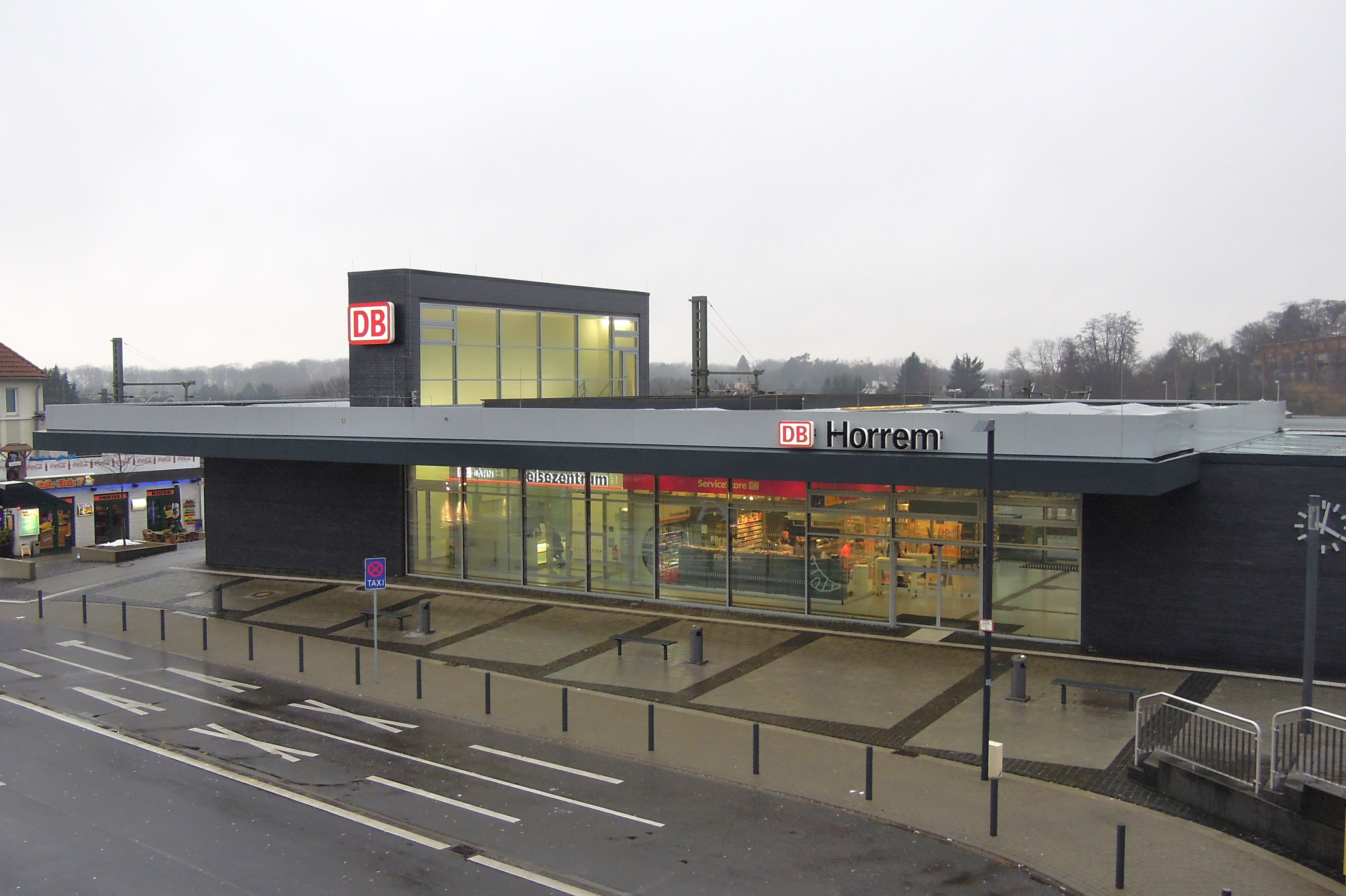 Bahnhof Horrem im Januar 2015.